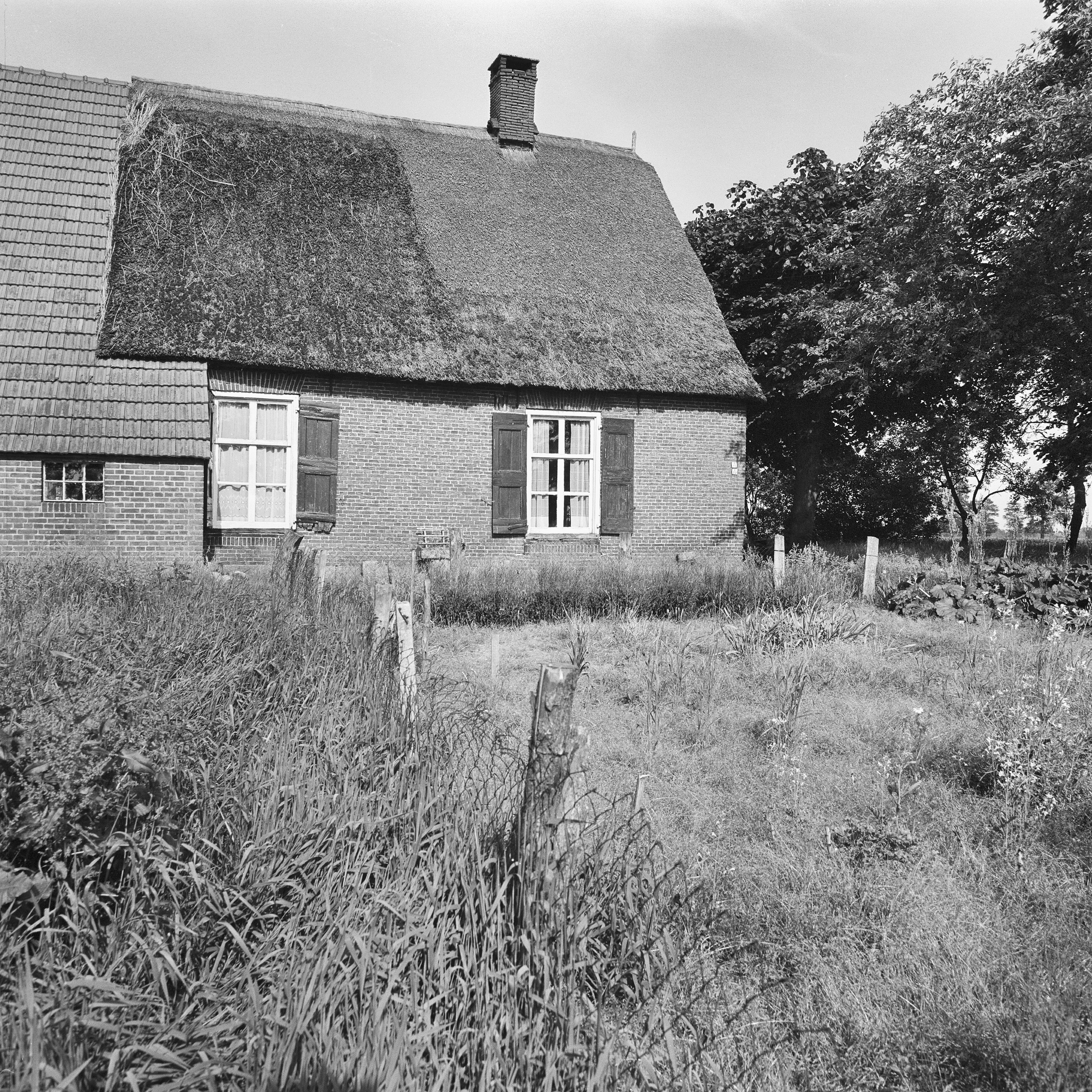 E: 23, gedeelte linker zijgevel